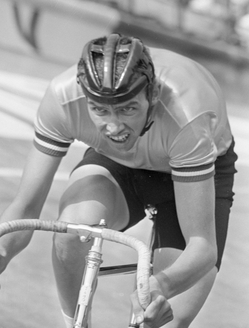 WK Wielrennen op de baan Amsterdam. Gert Bongers in aktie